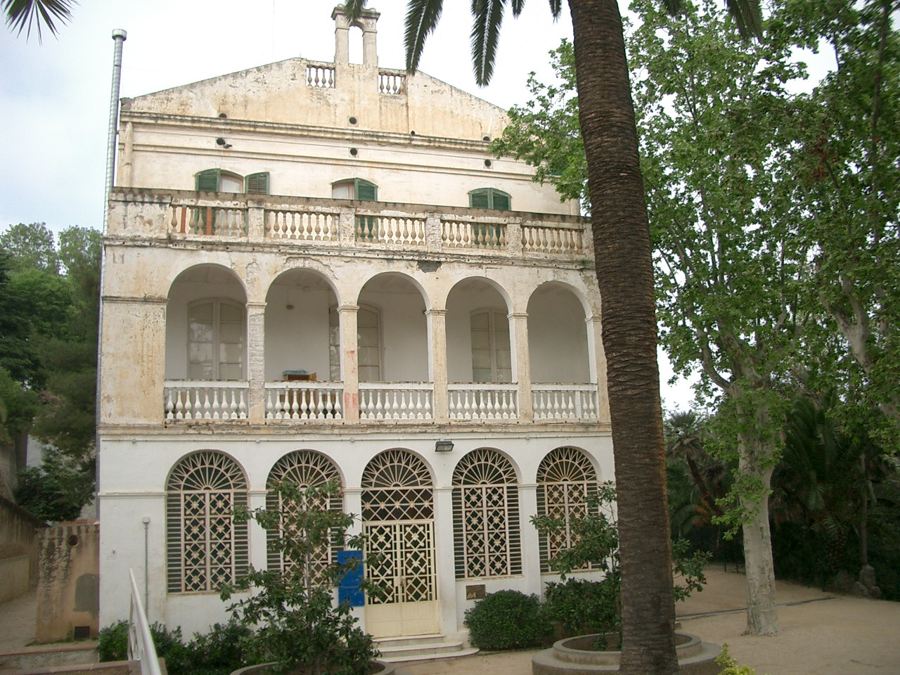 Un dels dos edificis que va acollir l'Escola Artur Martorell fins al 2007. La fotografia es va fer el 2007, quan l'escola ja s'havia traslladat a l'edifici nou.